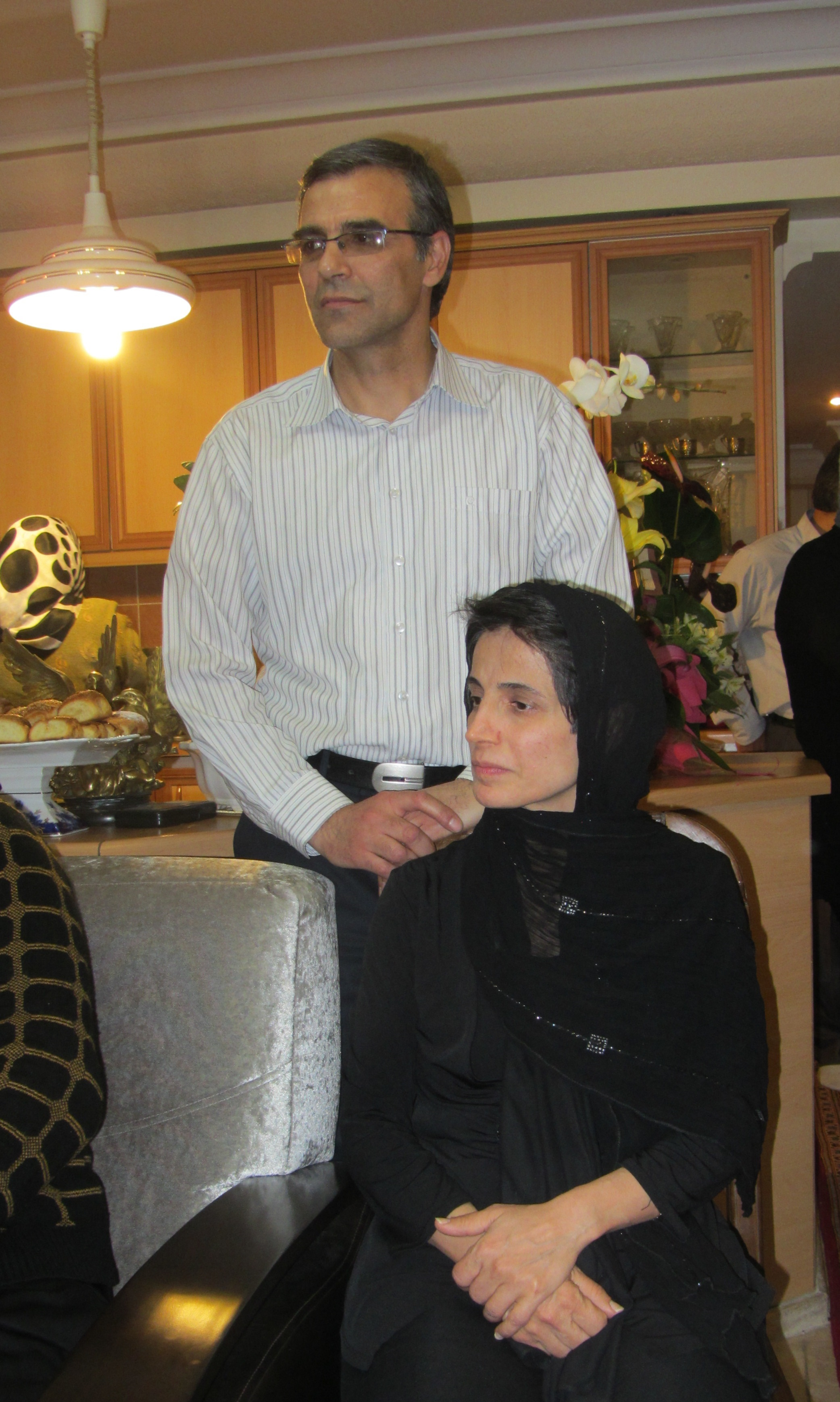 نسرین ستوده در کنار همسر خود رضا خندان